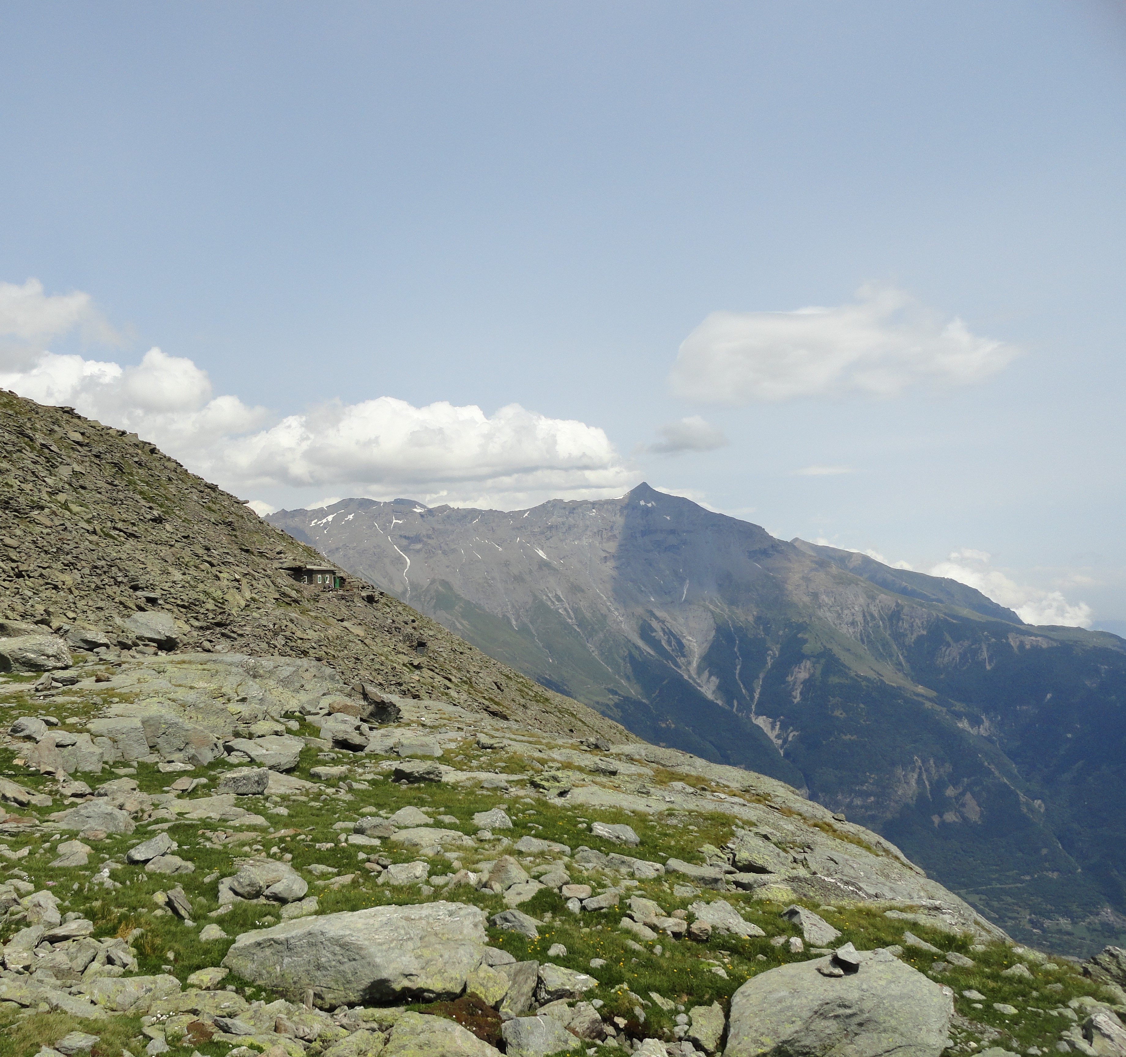 Il rifugio "incastonato" nella cresta della montagna